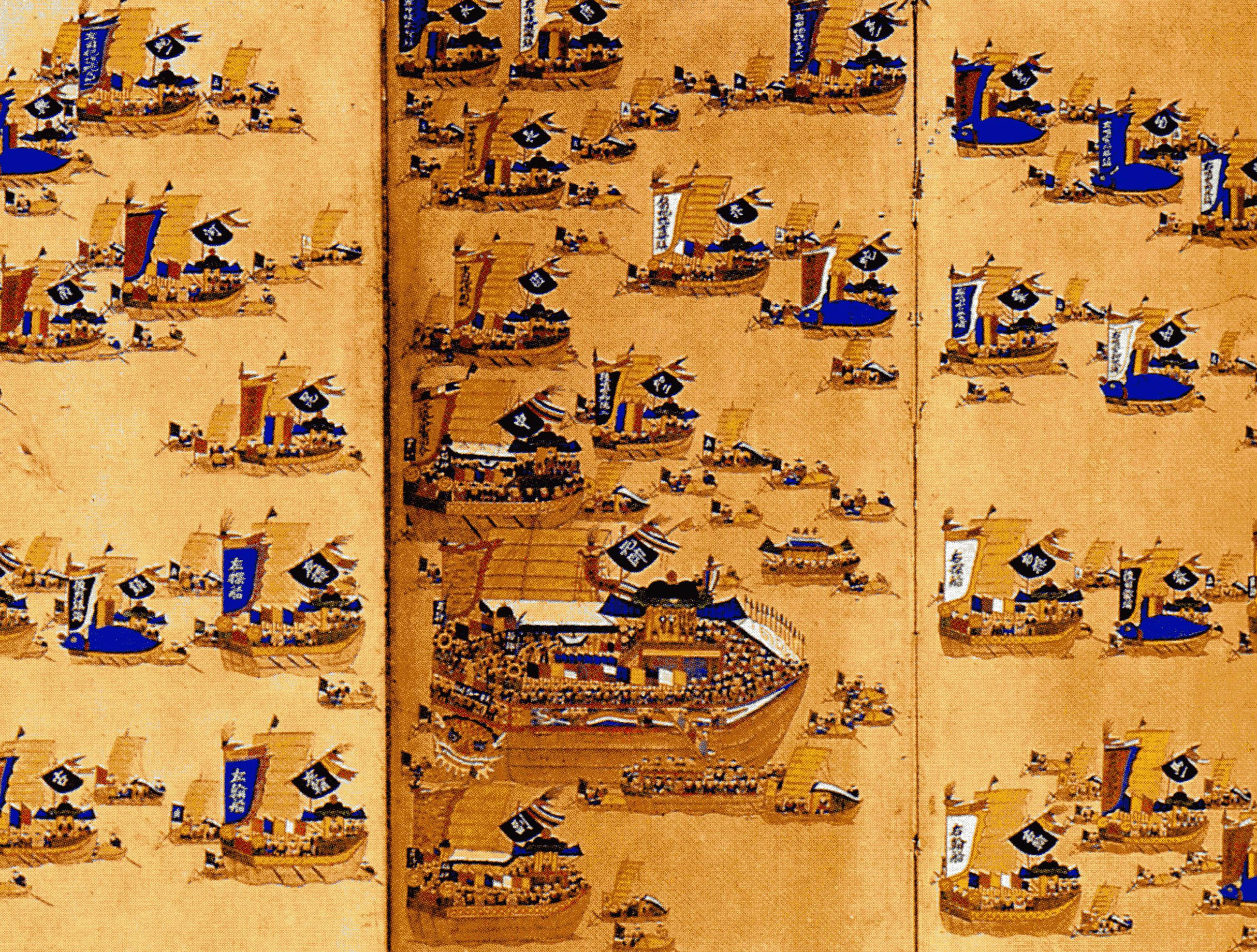 戦船図屏風画 韓国文化院所蔵 李舜臣（三道水軍統制使）朝鮮水軍、鶴翼の陣。中央には李舜臣司令船（元帥旗、板屋船）が描かれている。亀甲船は青色で描かれている。